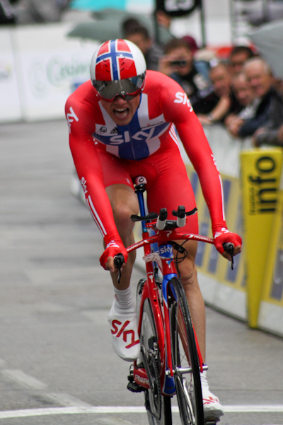 Prologue du Dauphiné Libéré 2011, Saint Jean de Maurienne